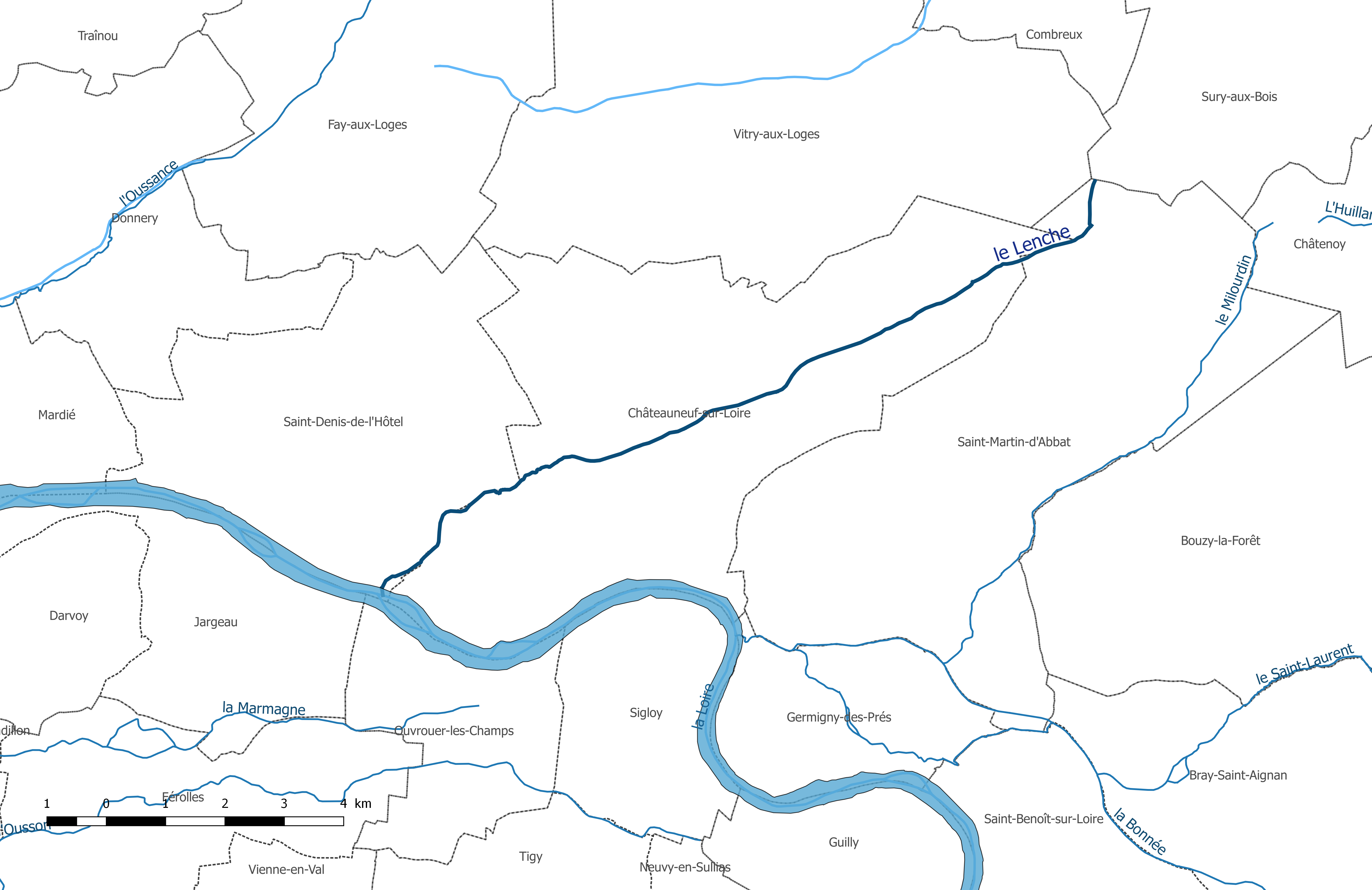 Carte du cours d'eau "la Lenche" et de ses affluents, dans le département du Loiret.